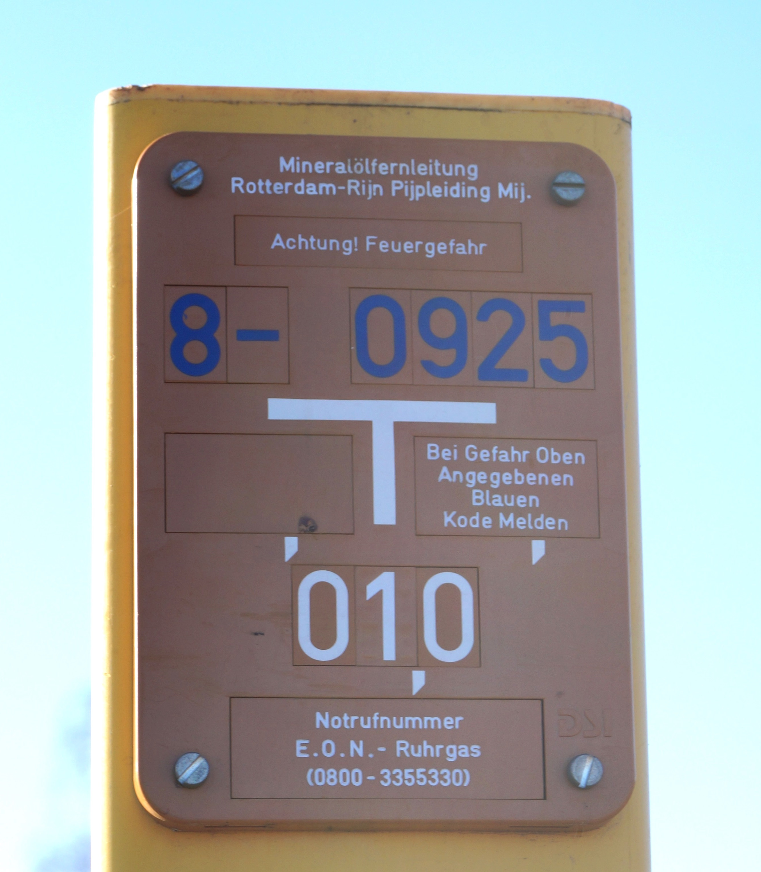 Hinweisschild Mineralölpipeline Rotterdamm-Rijn in Korschenbroich